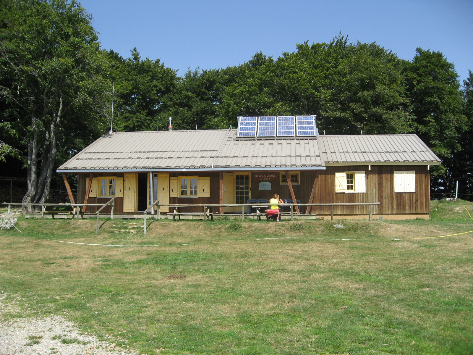 Réfuge de Chioula (Ignaux, Ariège, France).